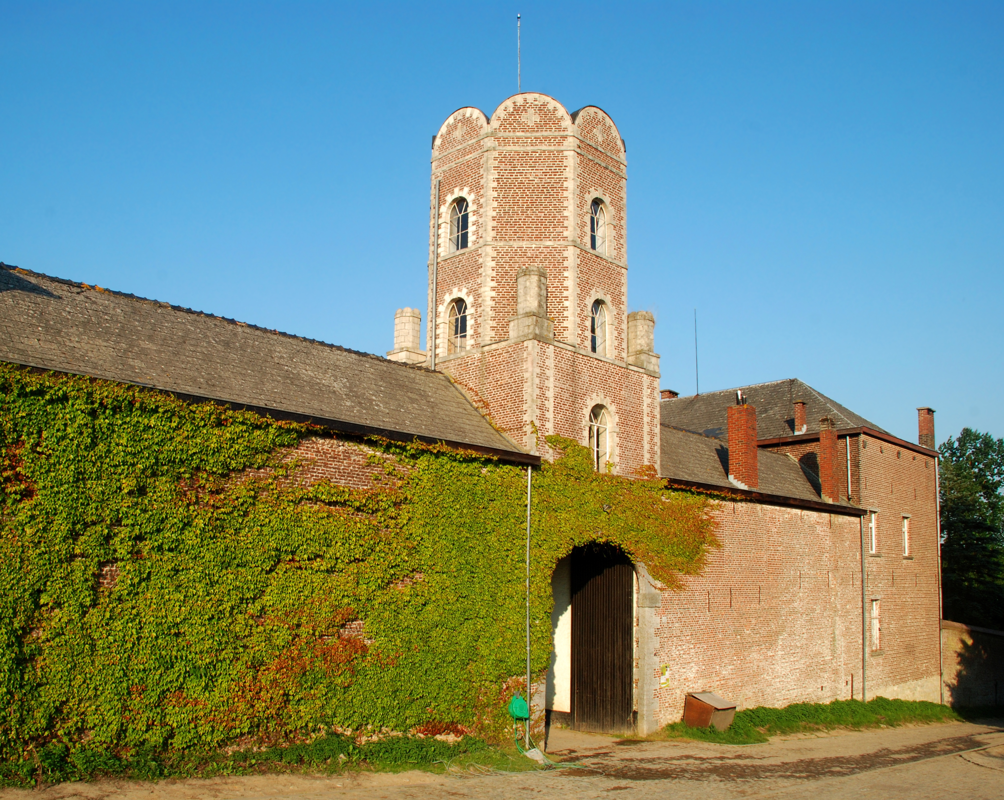 Belgique - Brabant wallon - Site de la bataille de Waterloo - Ferme de la Papelotte